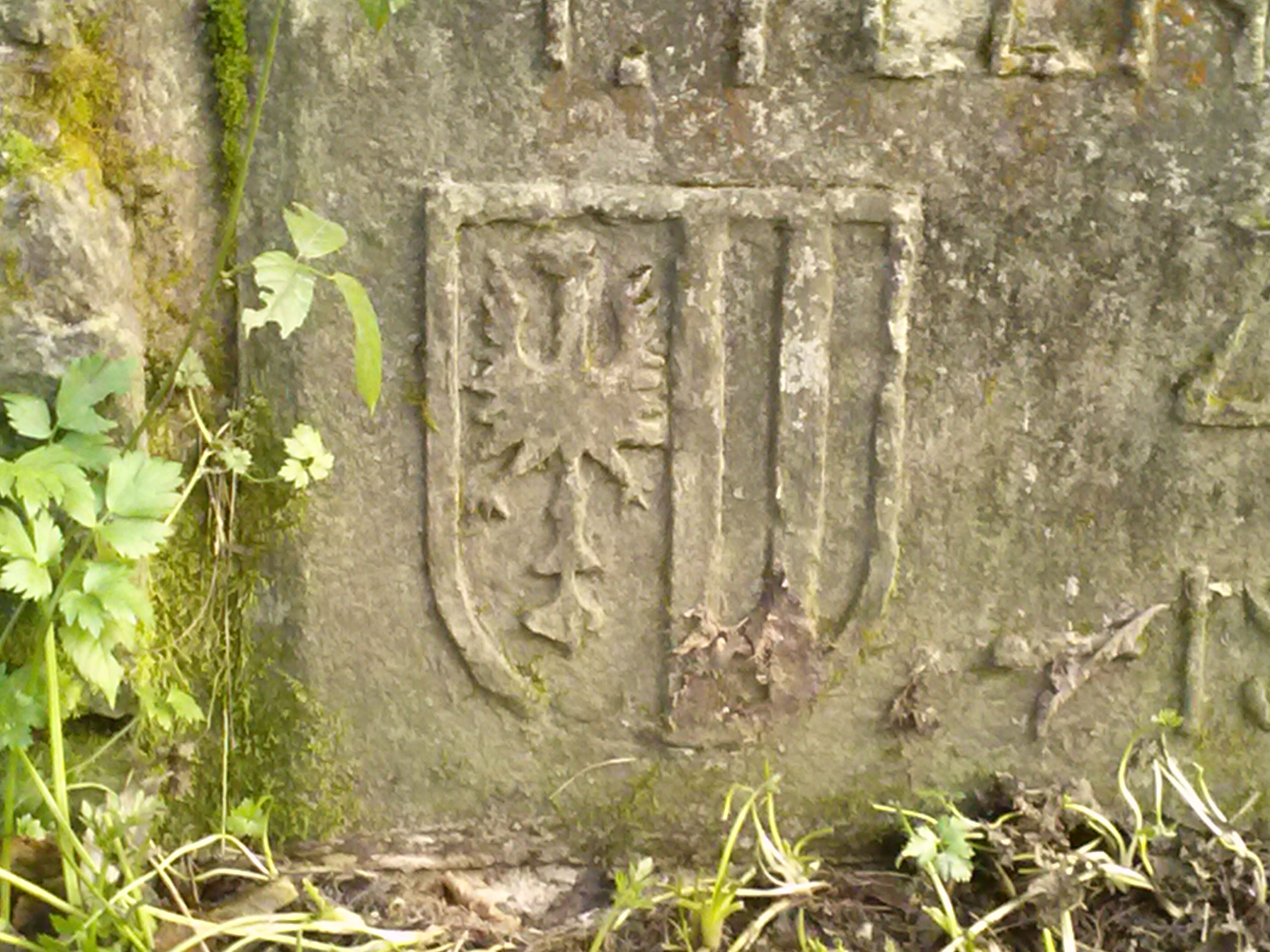 Gedenkstein in Sinnersdorf, der vom Alpenjägerregiment 7 anlässlich der Landnahme aufgestellt wurde.